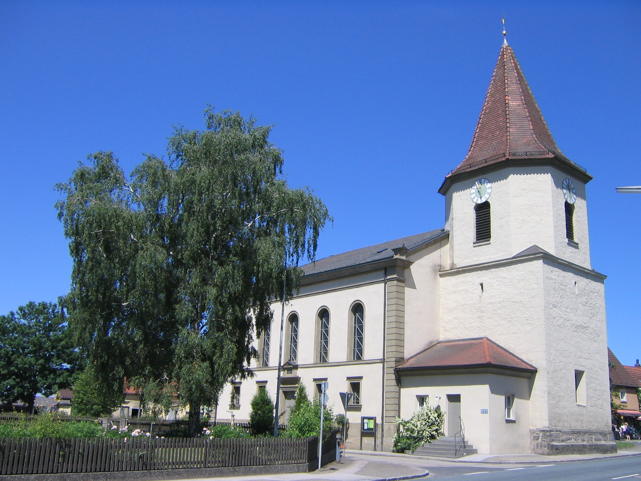 Kirche von Lehengütingen, einem Ortsteil von Schopfloch